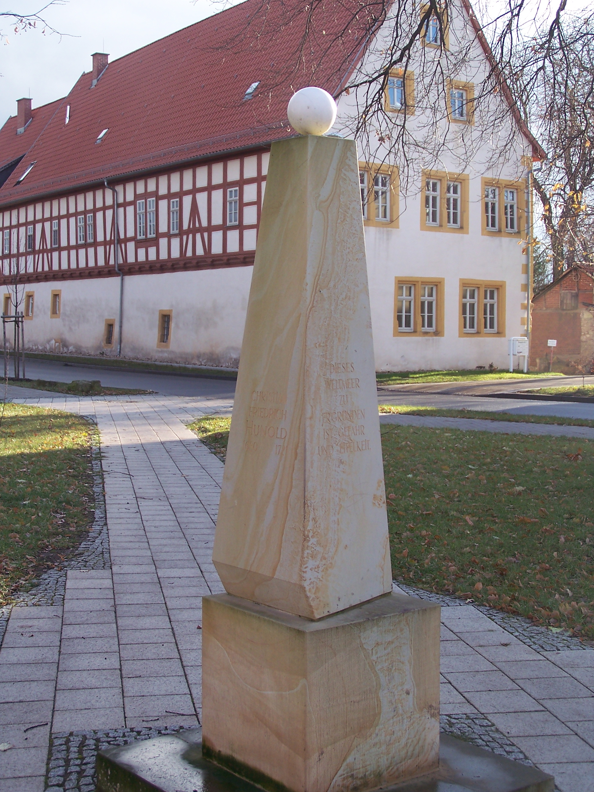 Denkmal zu Ehren von Christian Friedrich Hunold in Wandersleben, Deutschland